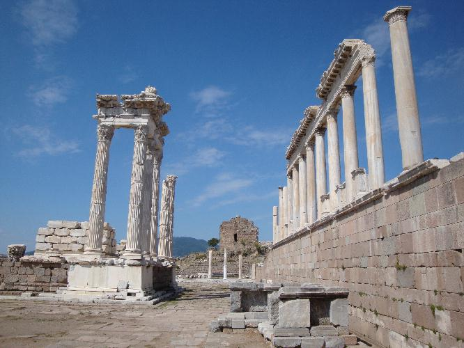 Pergamum (Temple of Trajan).